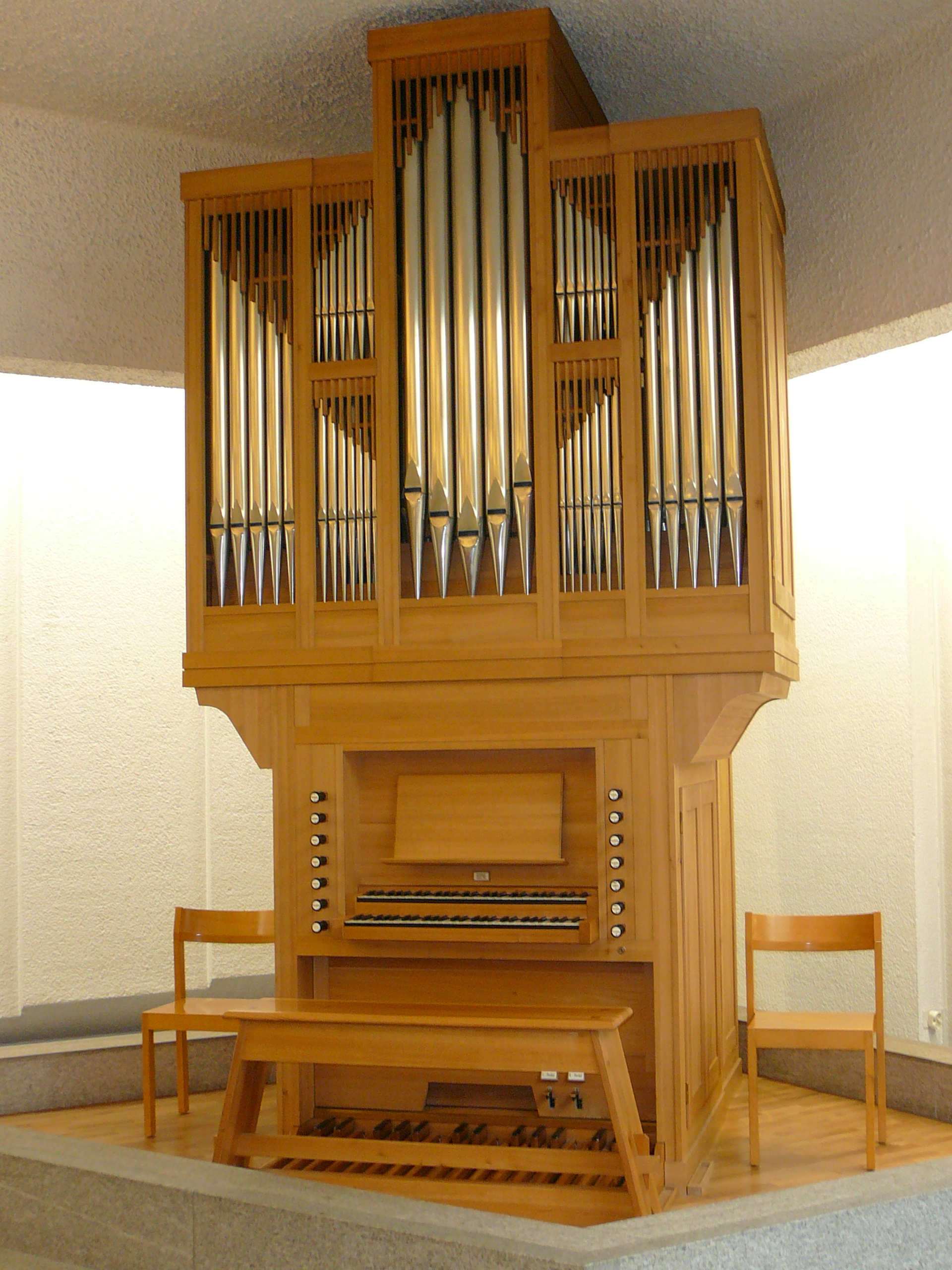 Römisch-katholische Kirche Herz Jesu Zürich-Wiedikon Orgel in Unterkirche